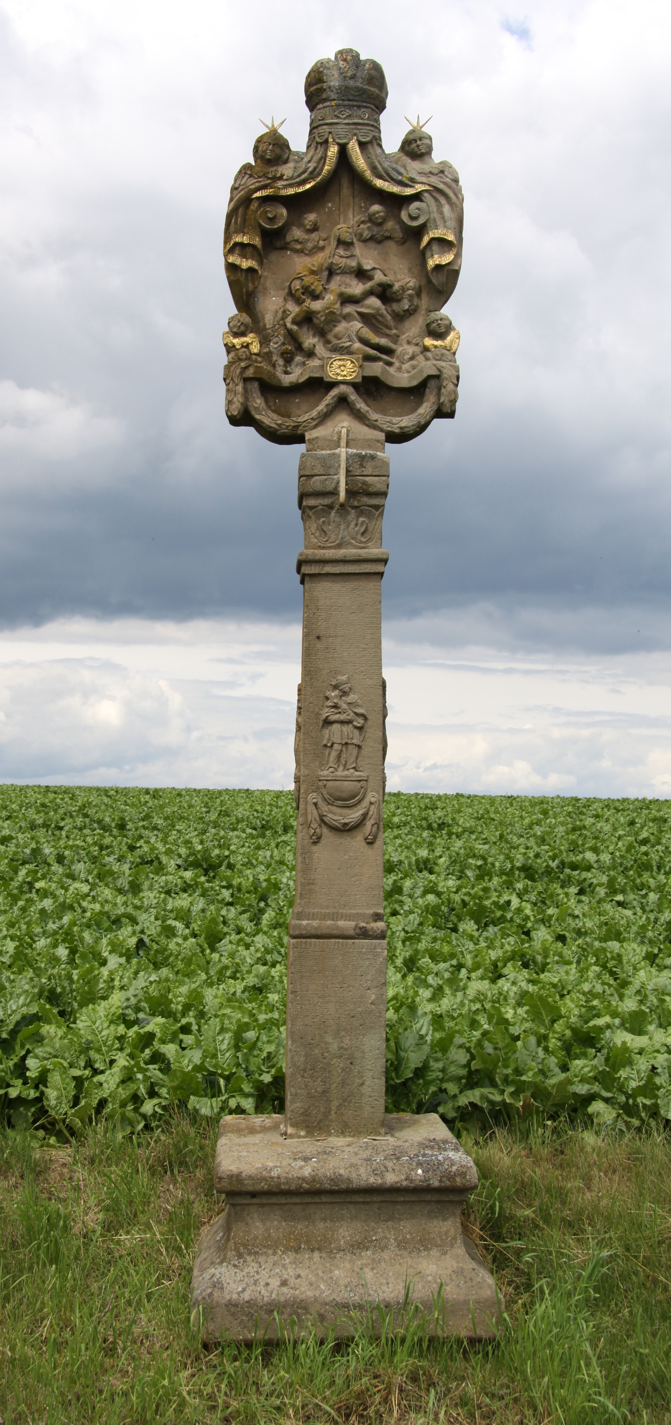 Bildstock aus Gnodstädter Sandstein in der Umgebung von Gnodstadt